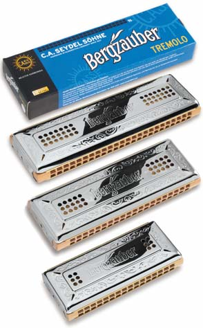 Seydel Tremolomundharmonia (Wender) "Bergzauber" mit Holzkanzellen